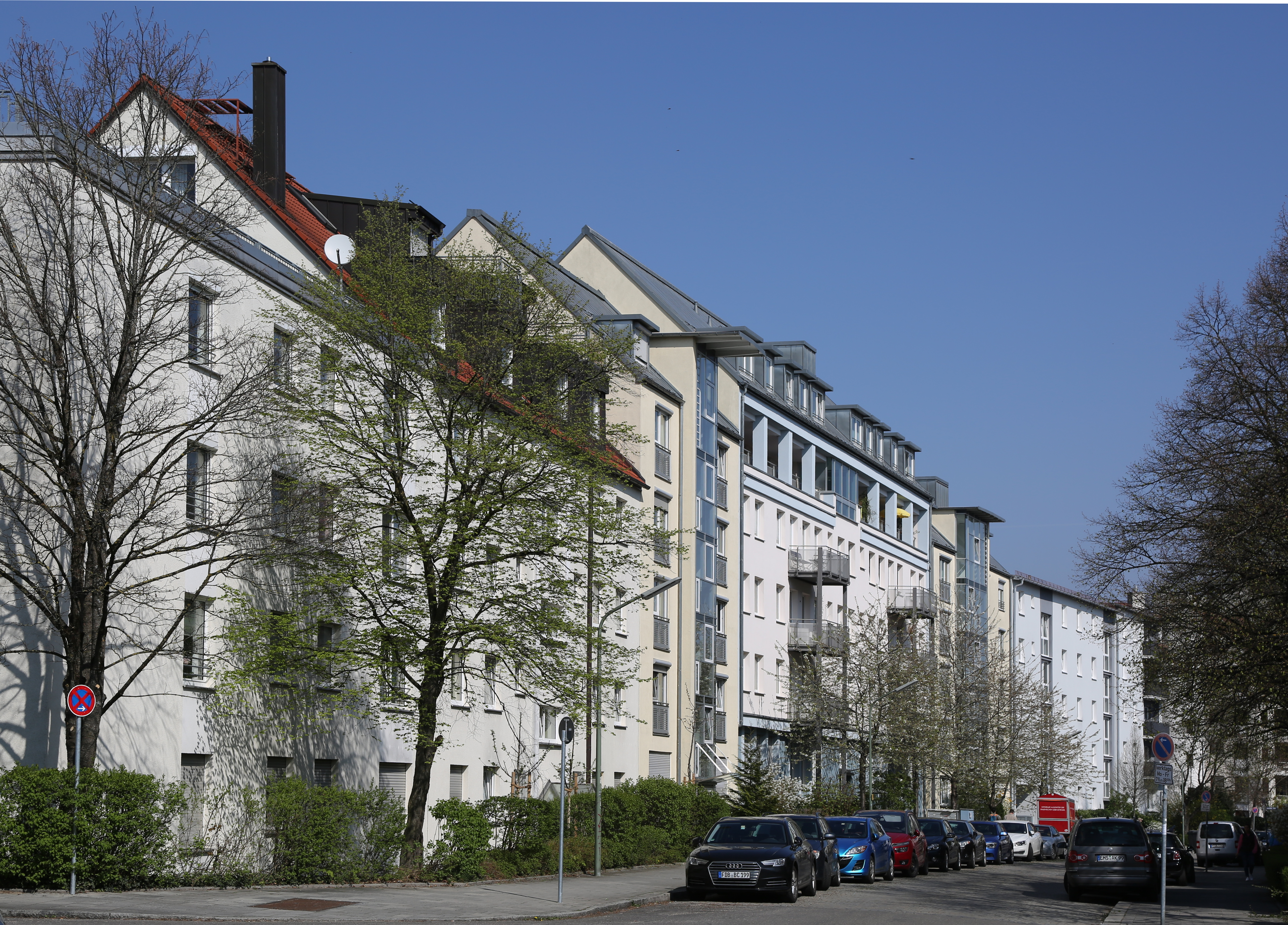 Typische Bausituation, Drachenseestraße München. Ist einmal ein Vorhaben mit größerer Firsthöhe, Geschossfläche, Grundfläche etc genehmigt, dürfen sich alle nachfolgenden Projekte daran orientieren.